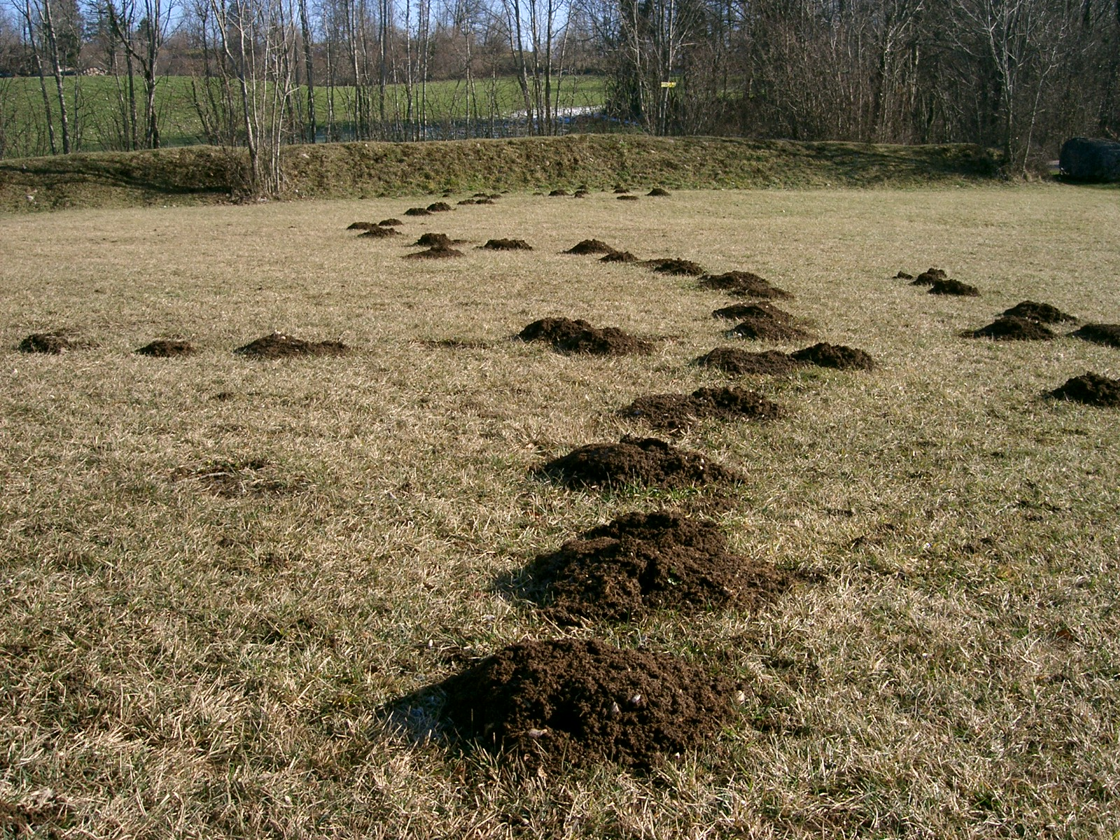 série de taupinières dessinant une ligne curieuse